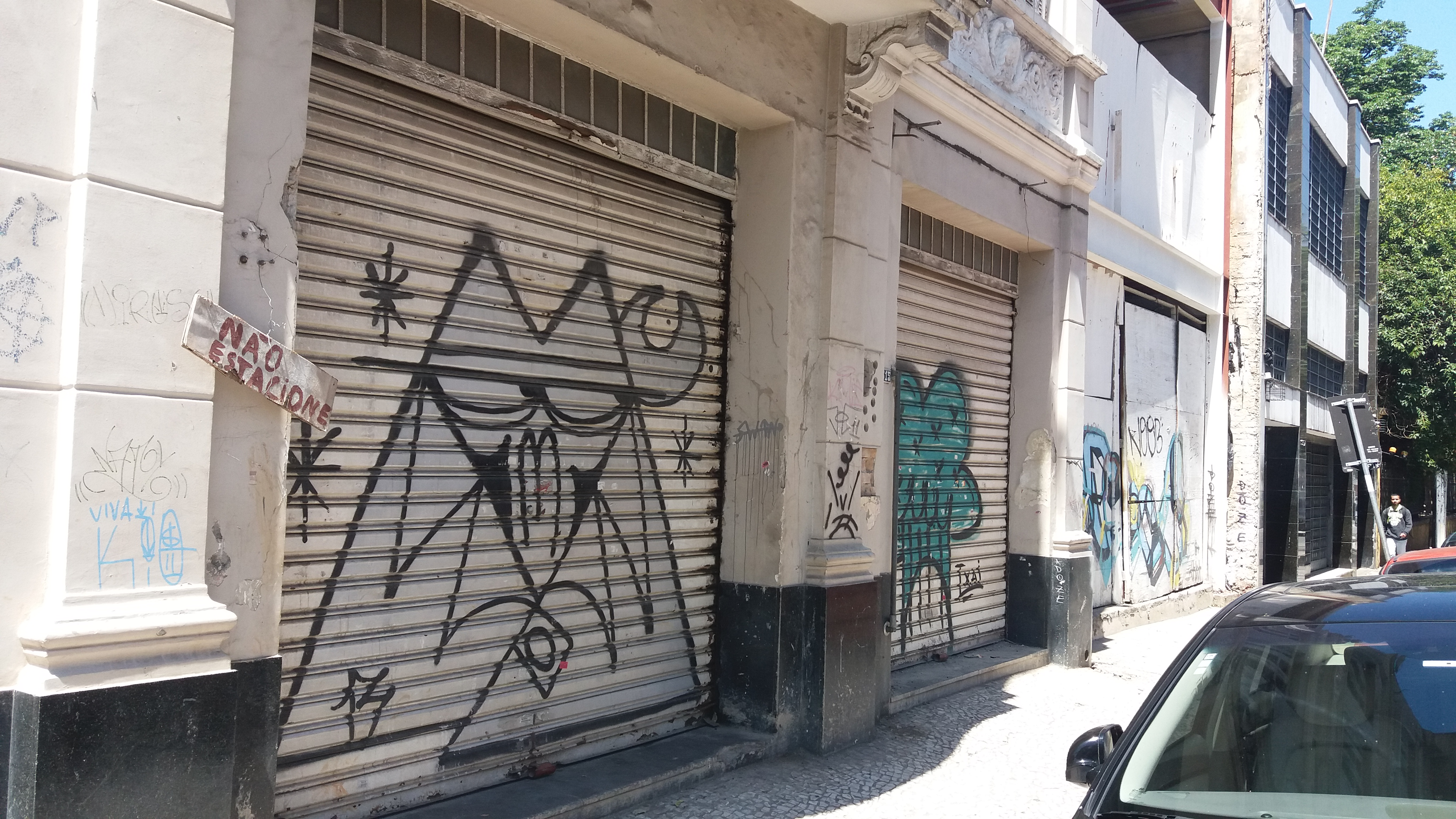 Portões do antigo Teatro Brasileiro de Comédia, na Bela Vista, em São Paulo, foram grafitados por artistas de rua